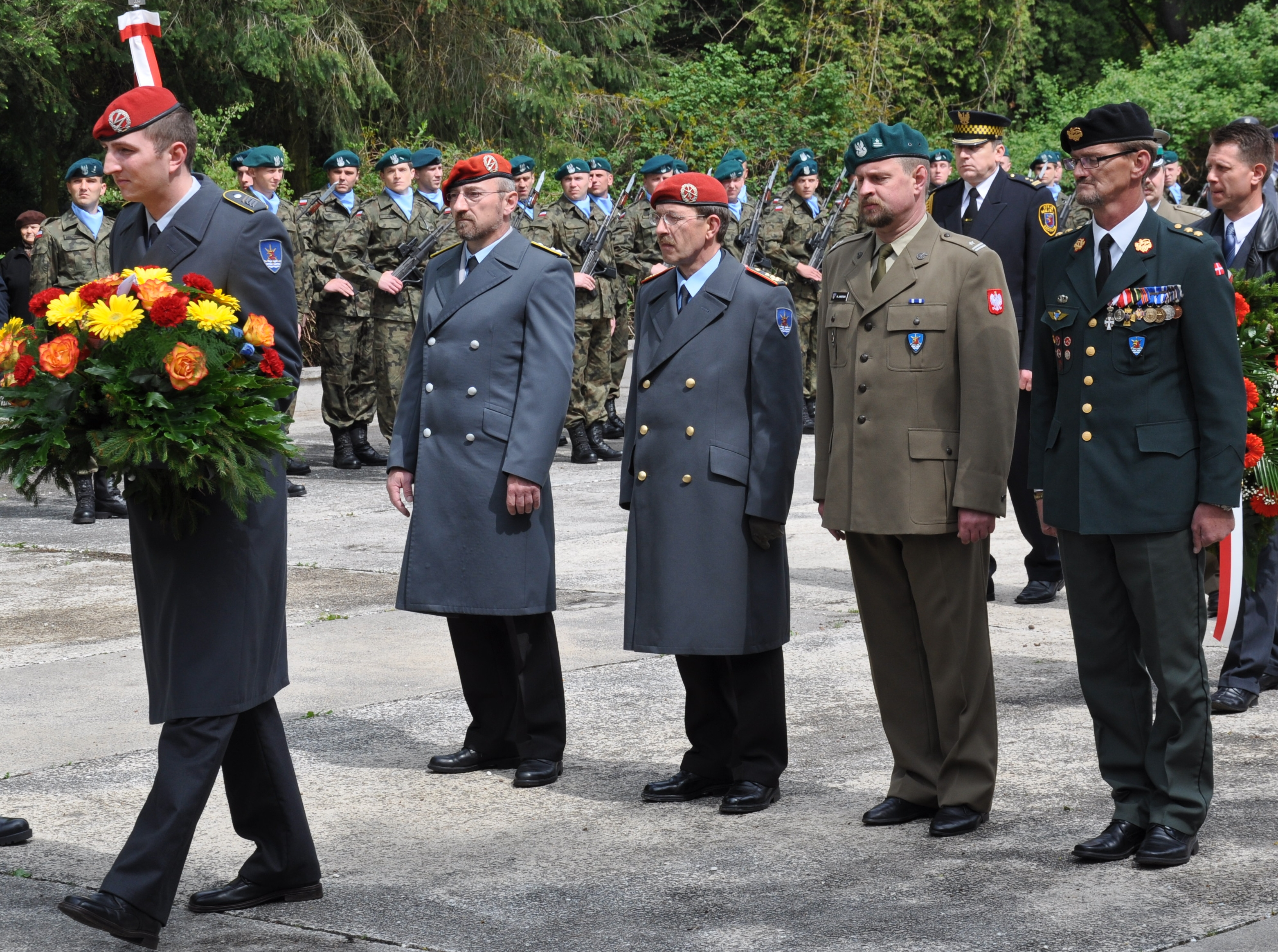 Dowódca Wielonarodowego Korpusu Północno Wschodniego składa kwiaty na Cmentarzu Centralnym w Szczecinie